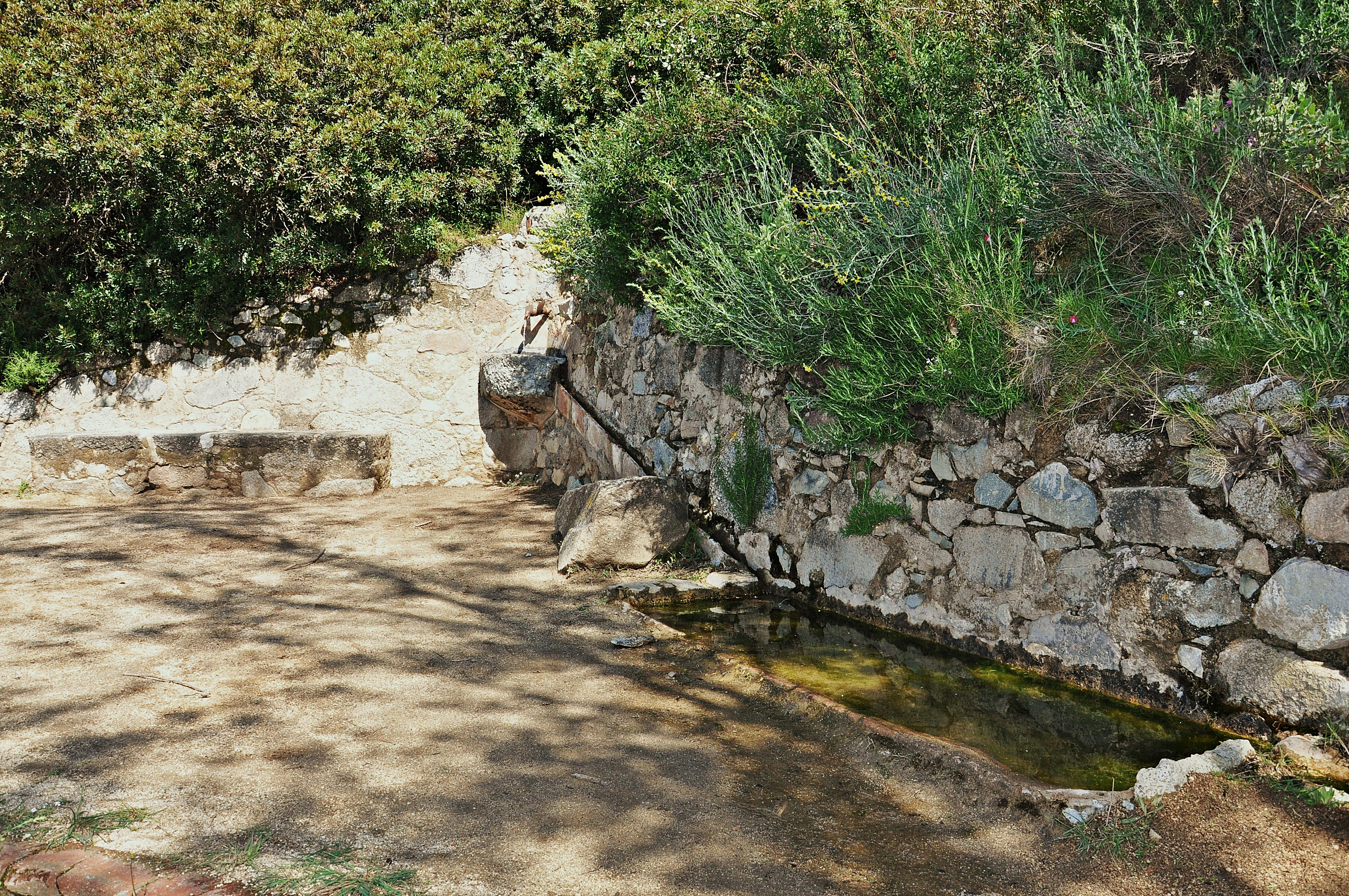 maresme-cataluña